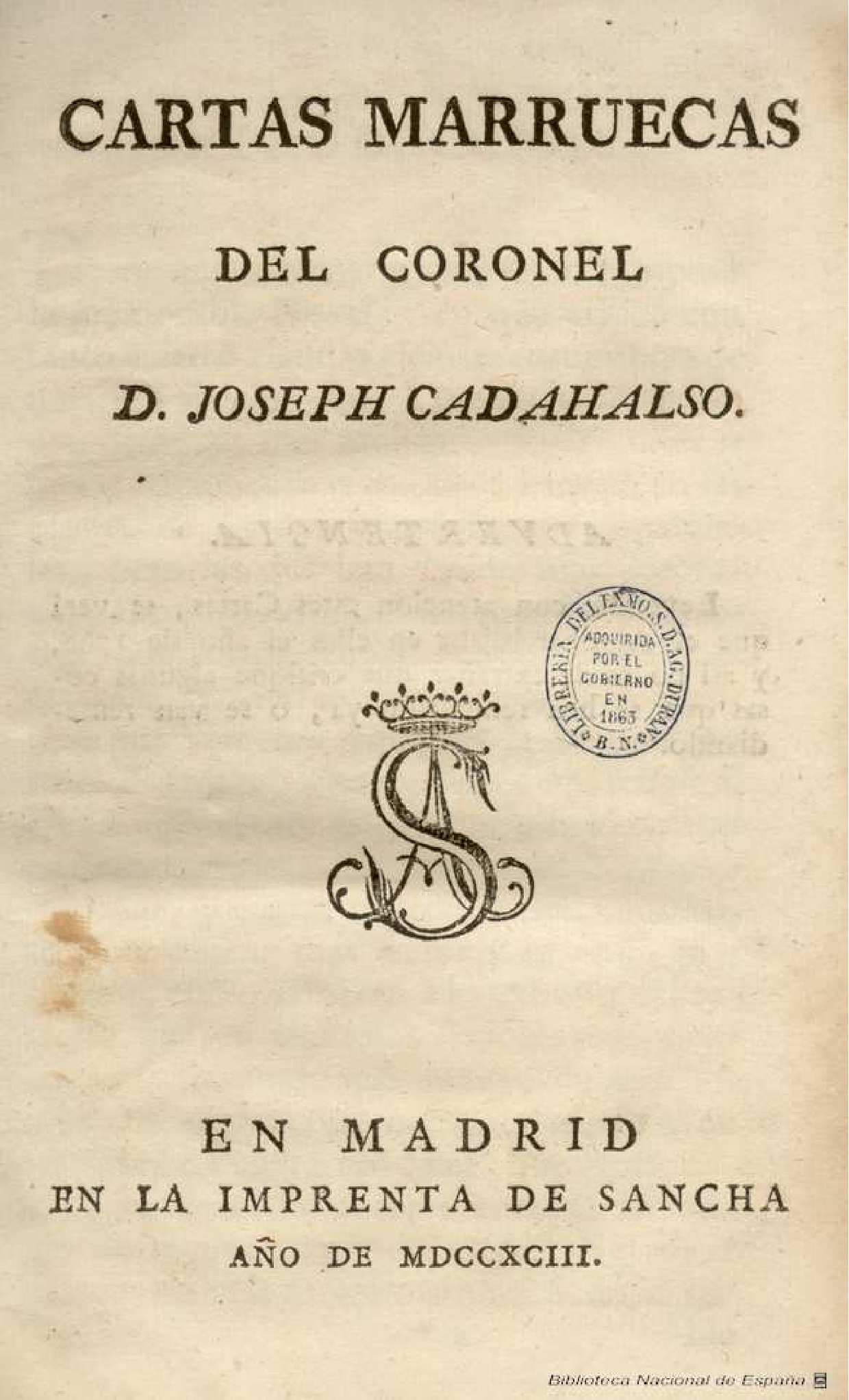 Cartas marruecas del Coronel D. Joseph Cadahalso Autor: Cadalso, José (1741-1782) Fecha: 1793 Datos de edición: En Madrid en la imprenta de Sancha